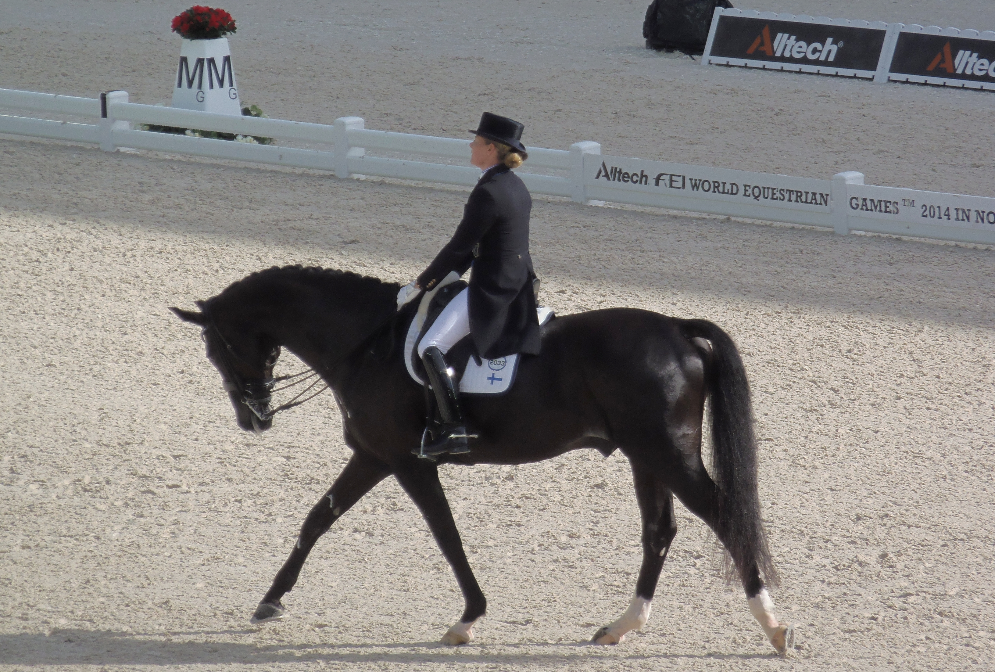 Mikaela Lindh en selle sur Skovlunds Más Guapo lors des Jeux équestres mondiaux, le 26 août 2014 au stade d'Ornano à Caen (Normandie, France).